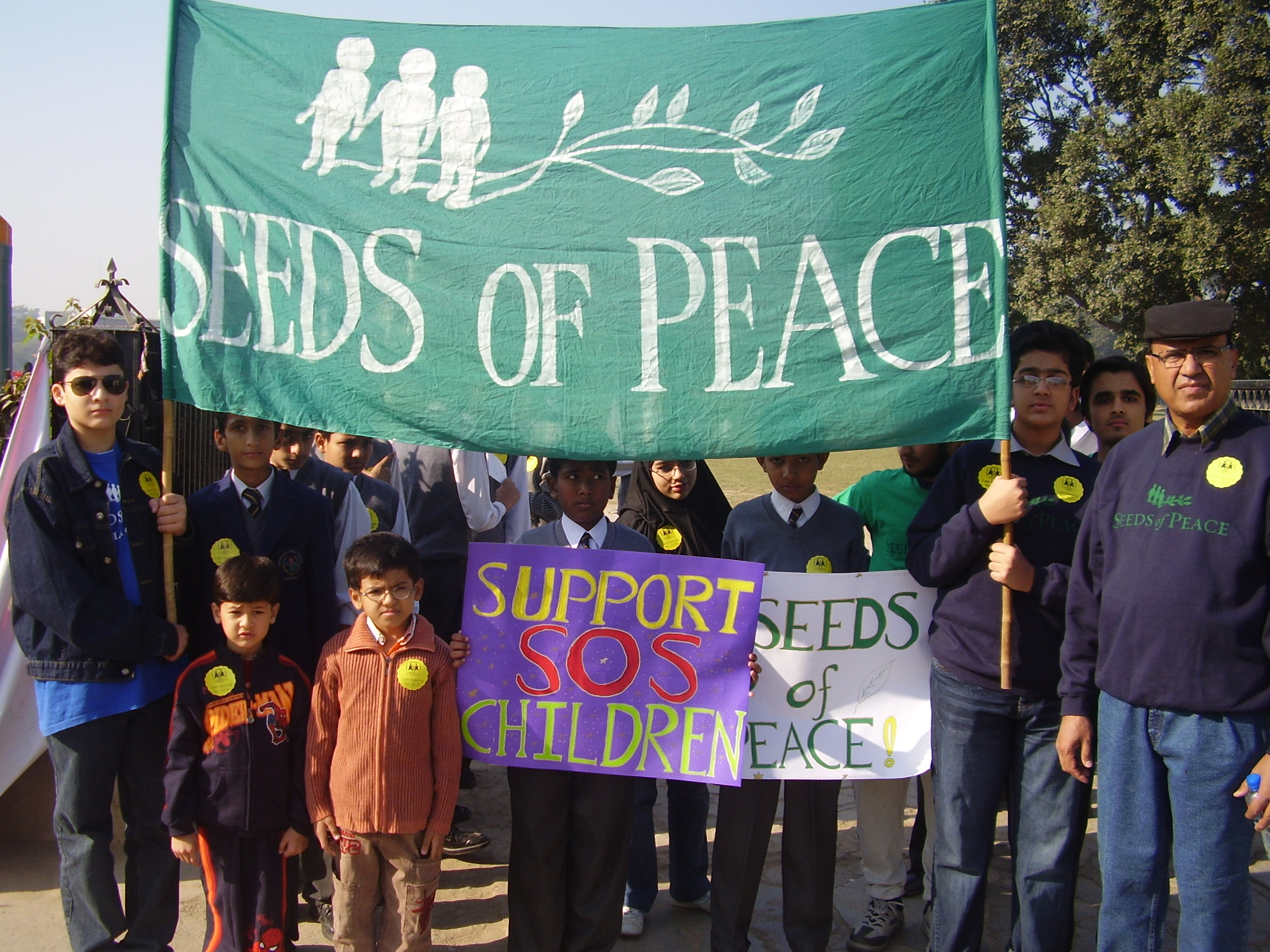 PB230066